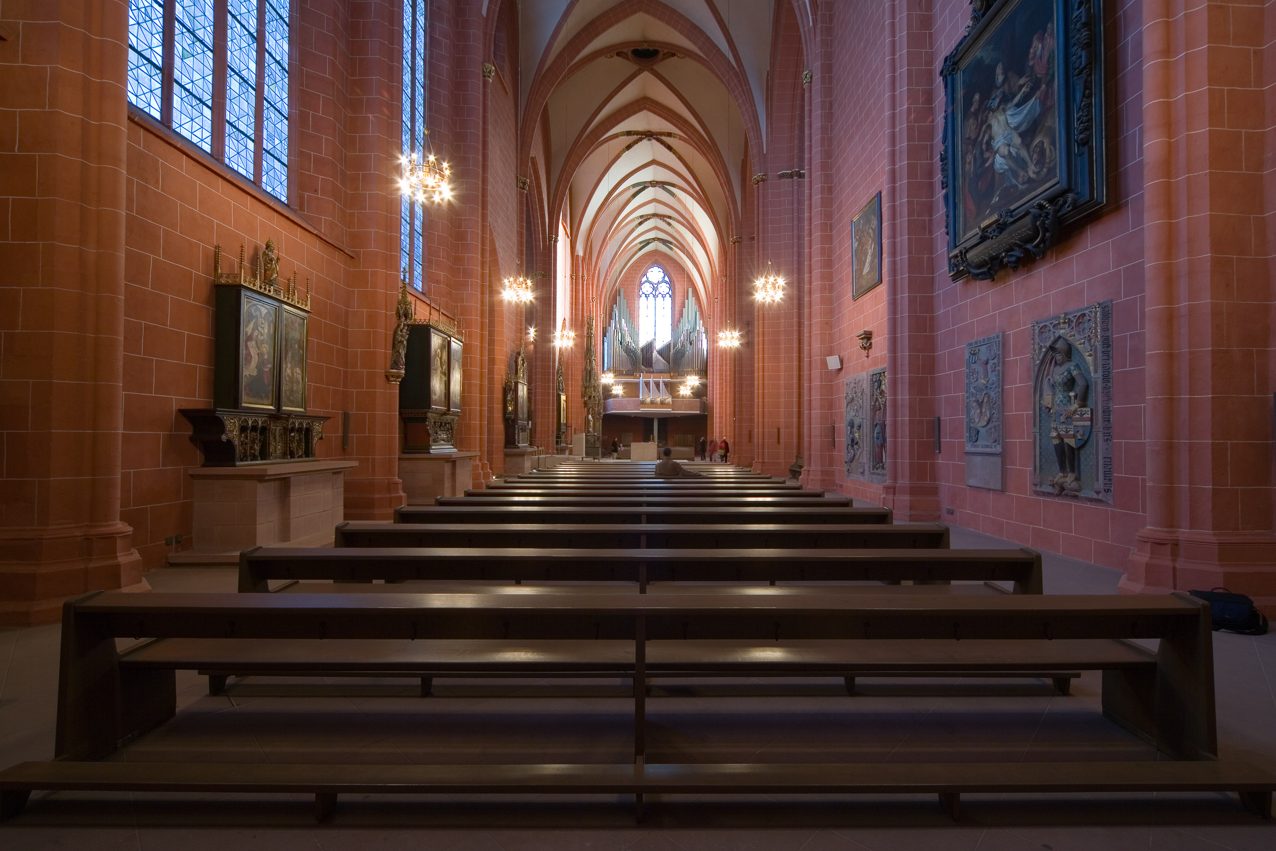 Blick ins Querhaus von Norden nach Süden im Kaiserdom St. Bartholomäus in Frankfurt am Main. Selber fotografiert im Februar 2008, Doppellizensierung GFDL & CC-BY-SA 2.5. Reshot version of the original Image:Mk Frankfurt Dom Querschiff.jpg uploaded by User:Magadan.